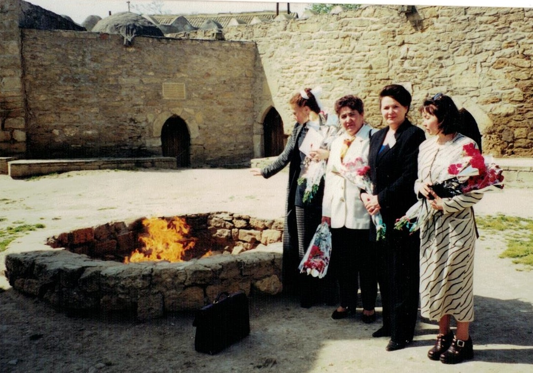 Крепость огнепоклонников. Азербайджан. 2000. Члены делегации из Башкортостана